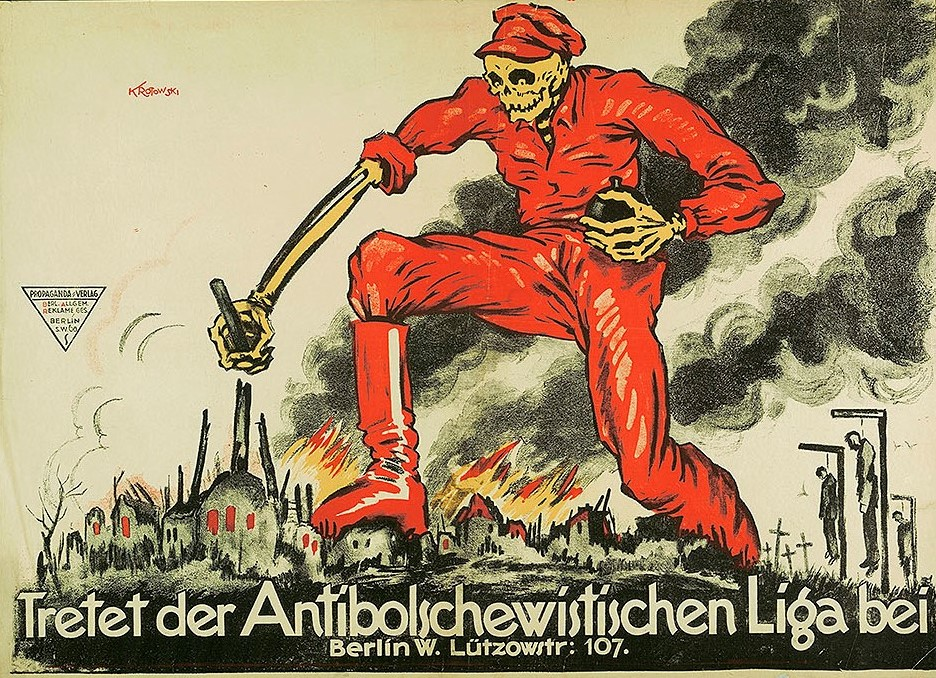 Stephan Krotowski - Tretet der Antibolschewistischen Liga bei, 1919. Propaganda-Verlag Berl. Allgem. Reklame Ges., Plakat 70 x 97 cm